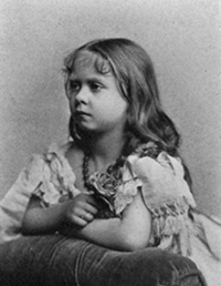 Princesa Margarida Beatriz Feodora da Prússia na infância